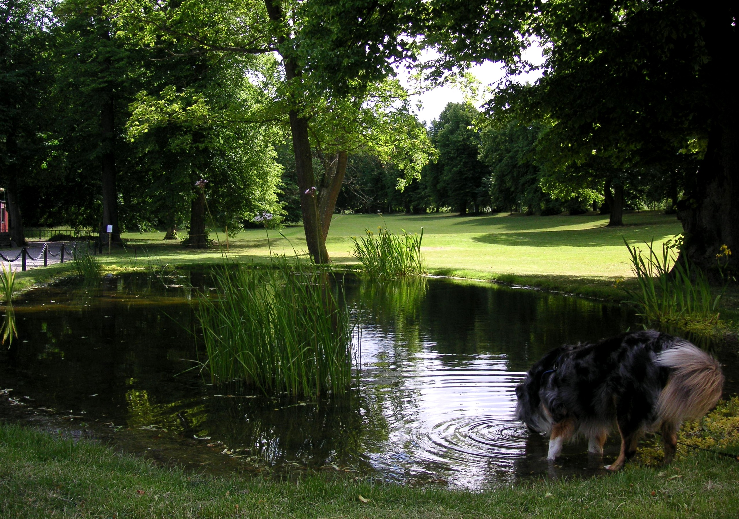 Ulvsunda slott, slottsparken, Bromma, Stockholm